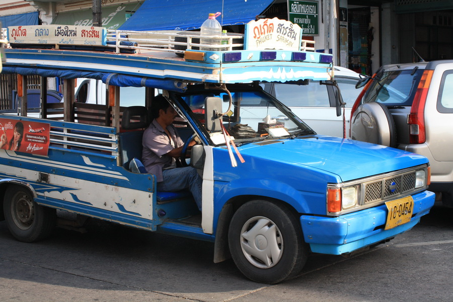 Общественный транспорт (сонгтэо) до пляжей из Пхукет-тауна